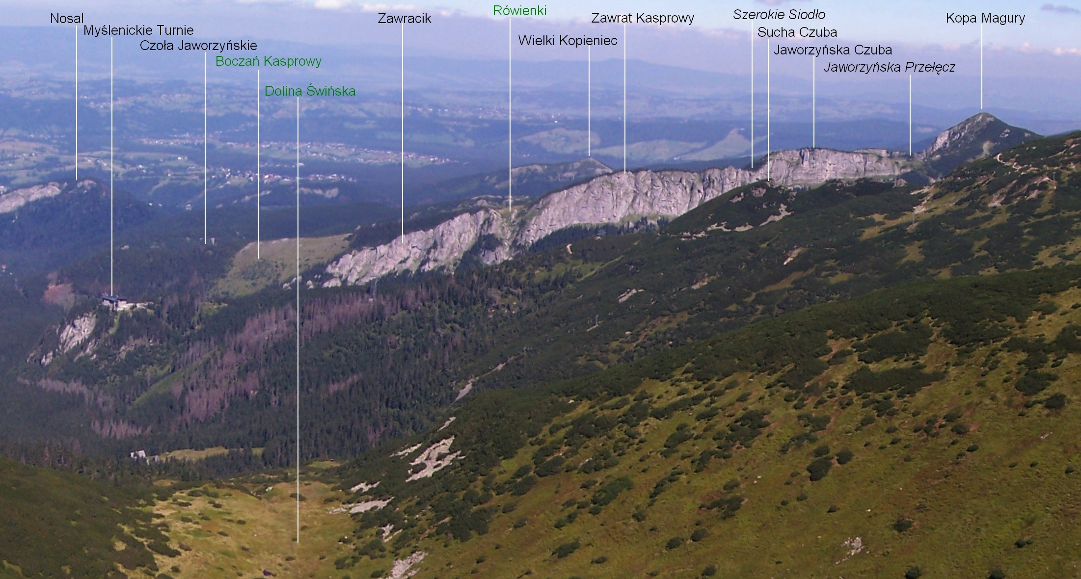 Widok z okolic Świńskiej Przełęczy